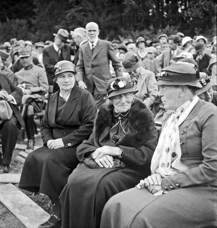 Einweihung Gedenkstein für alt Bundesrat Karl Scheurer (1872-1929), Zuschauer, am Jolimont. Von rechts nach links: Anna Kellerhals-Scheurer (Schwester des BR), Verena Scheurer-Grossenbacher (Mutter des BR), Martha Kellerhals-Leutwyler, im Hintergrund stehend: Johann Otto Kellerhals